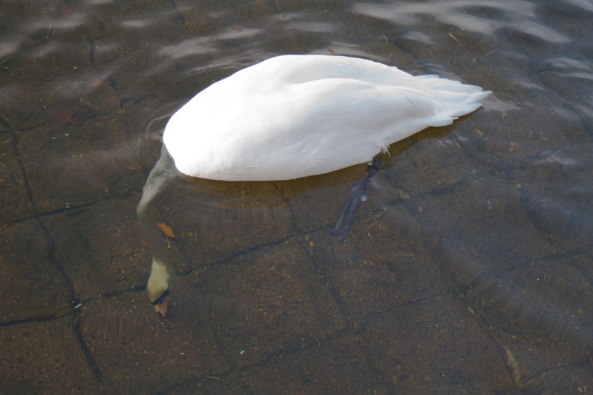 Gründelnder Schwan